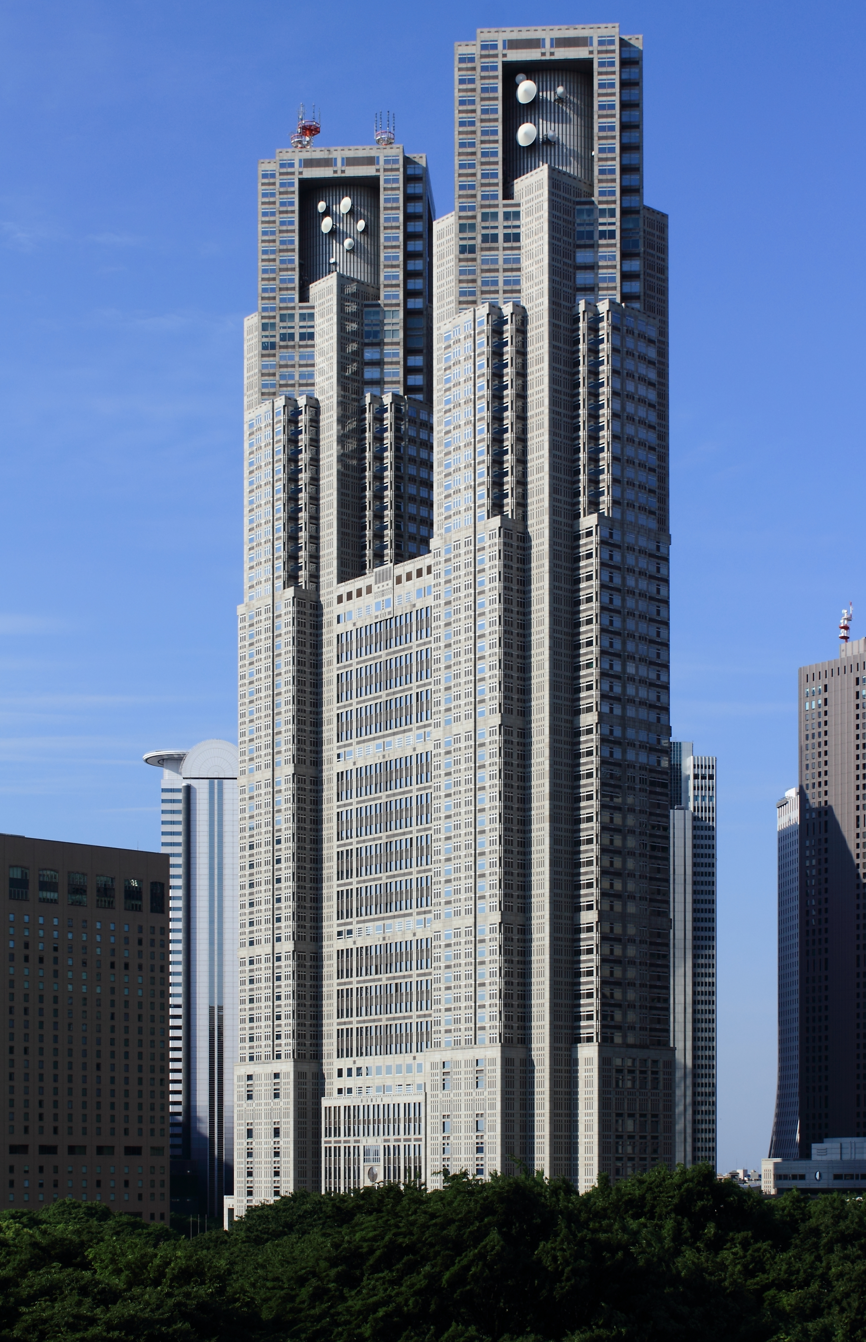 東京都庁第一本庁舎（東京都新宿区）